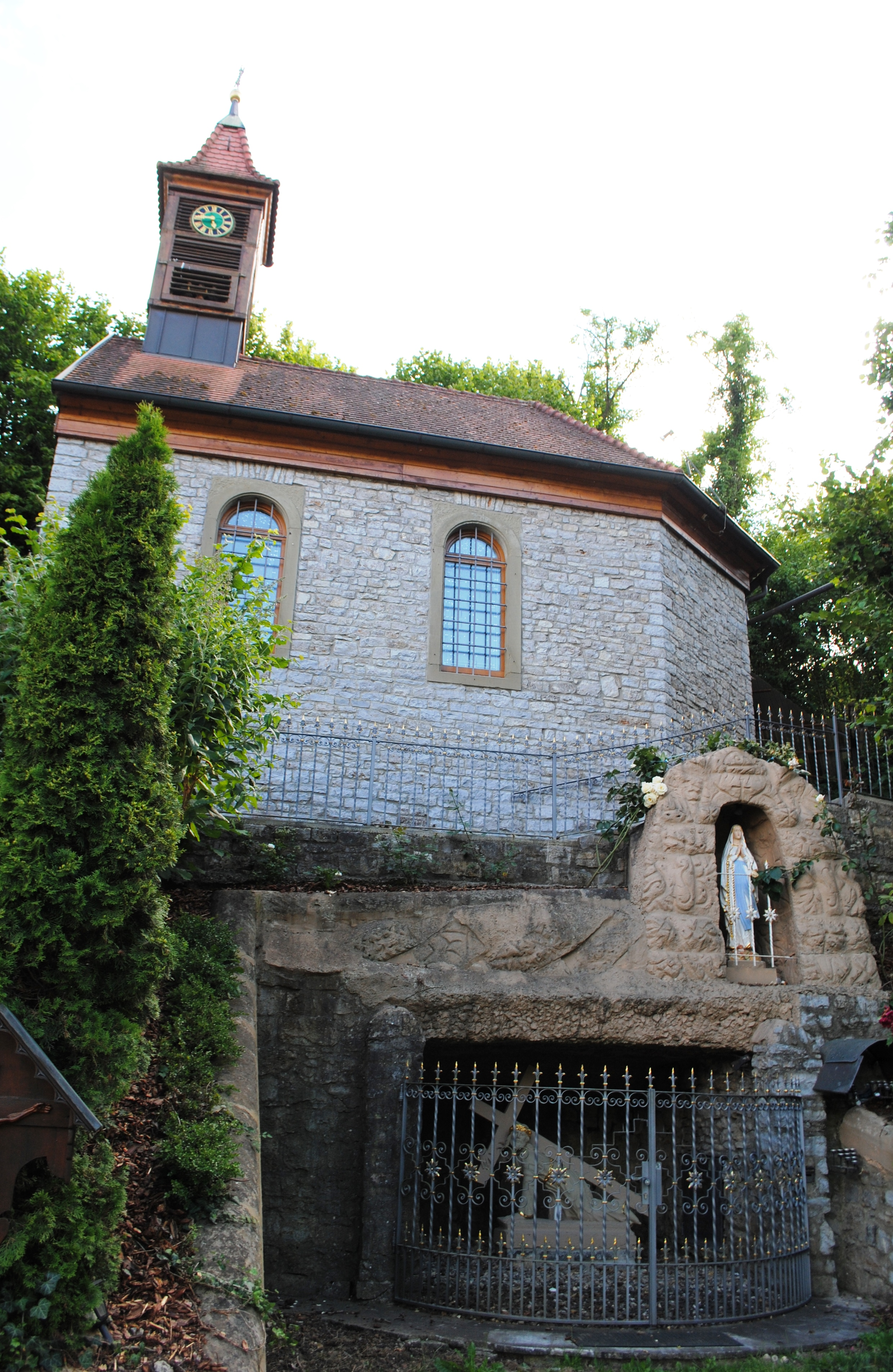 Kapelle, Lourdesgrotte, Escherndorf